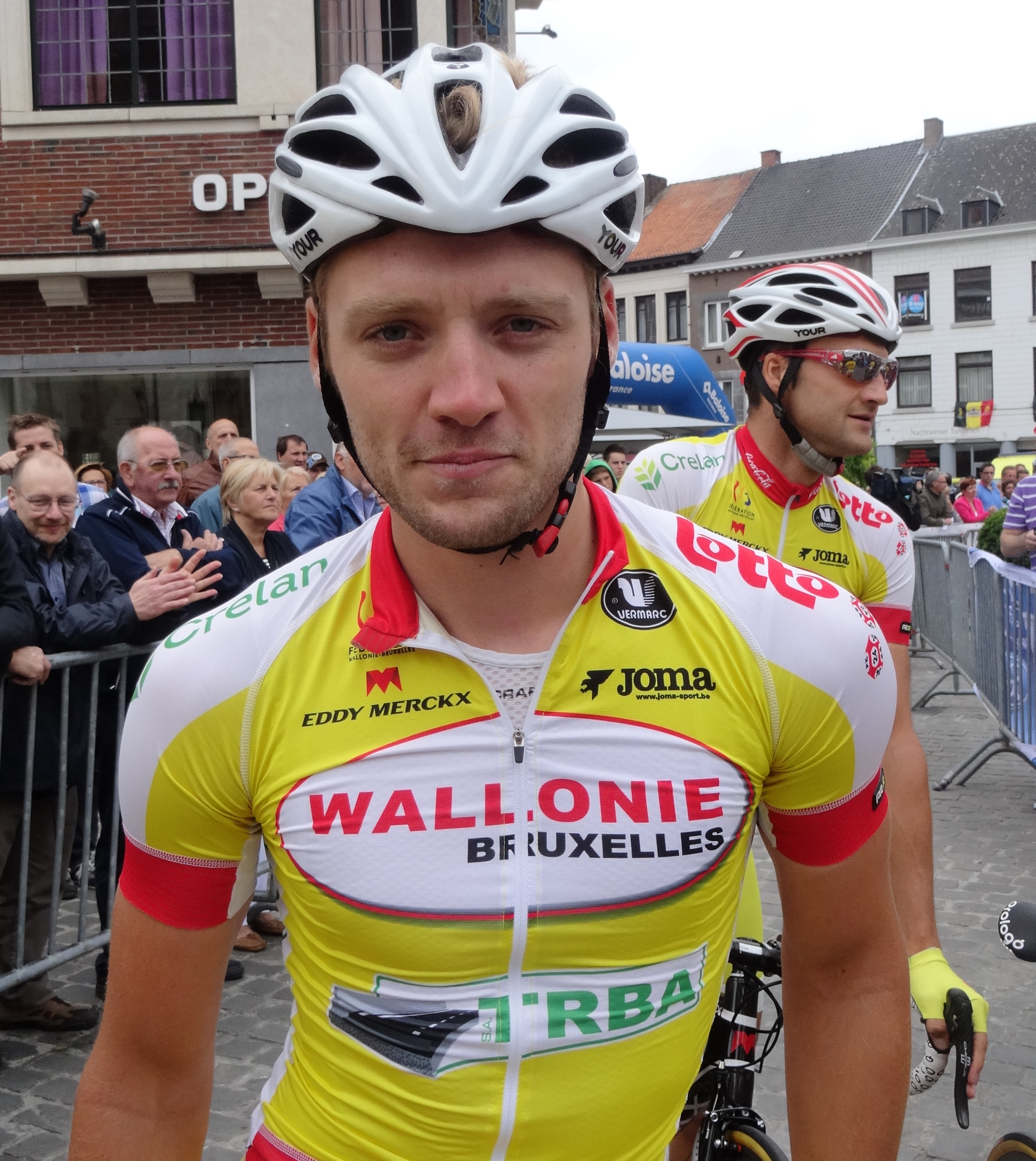 Reportage photographique réalisé le dimanche 15 juin à l'occasion du départ et de l'arrivée du Tour du Limbourg 2014 à Tongres, Belgique.